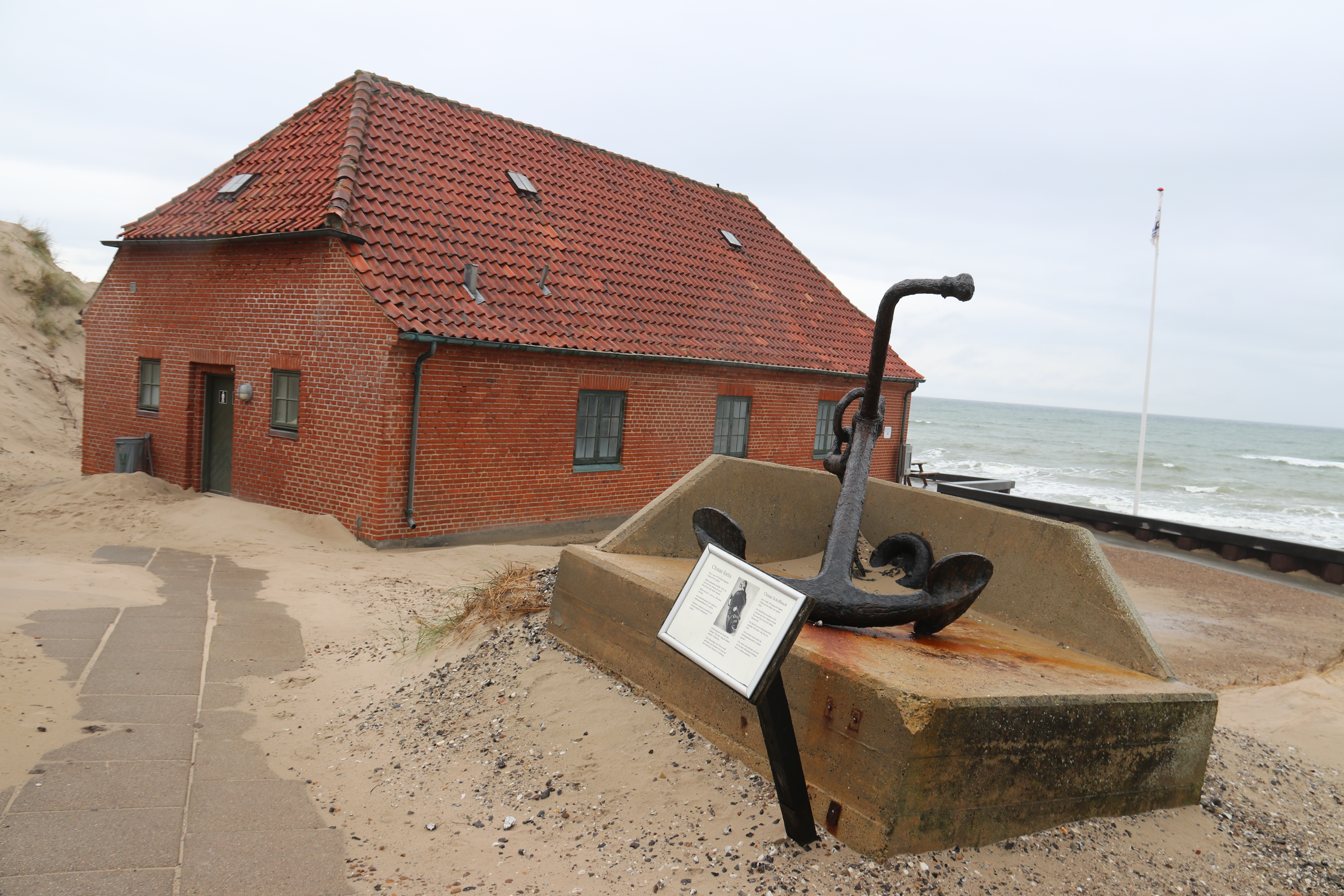 Løkken Bootshaus